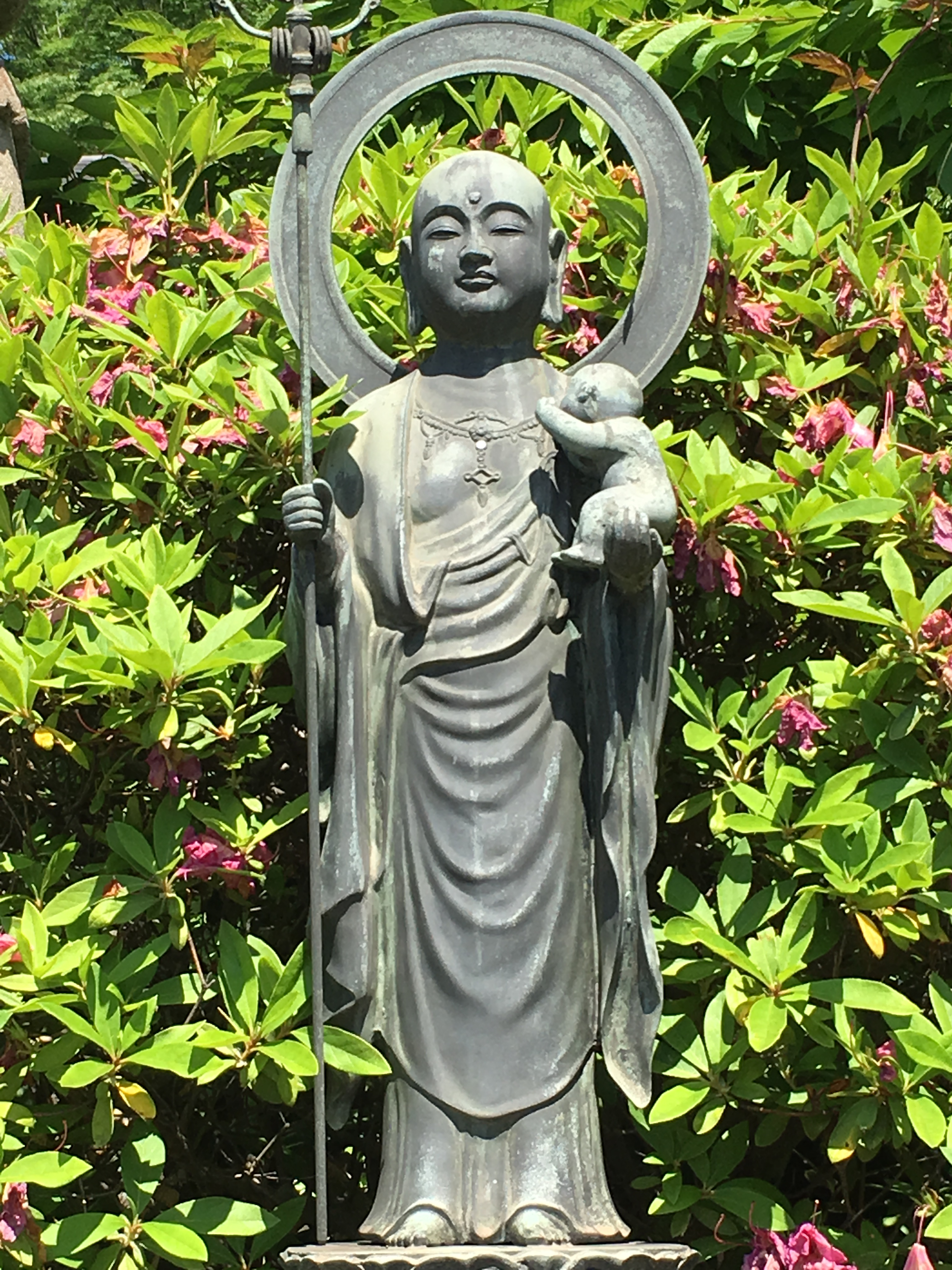 胤重寺で取った水子地蔵